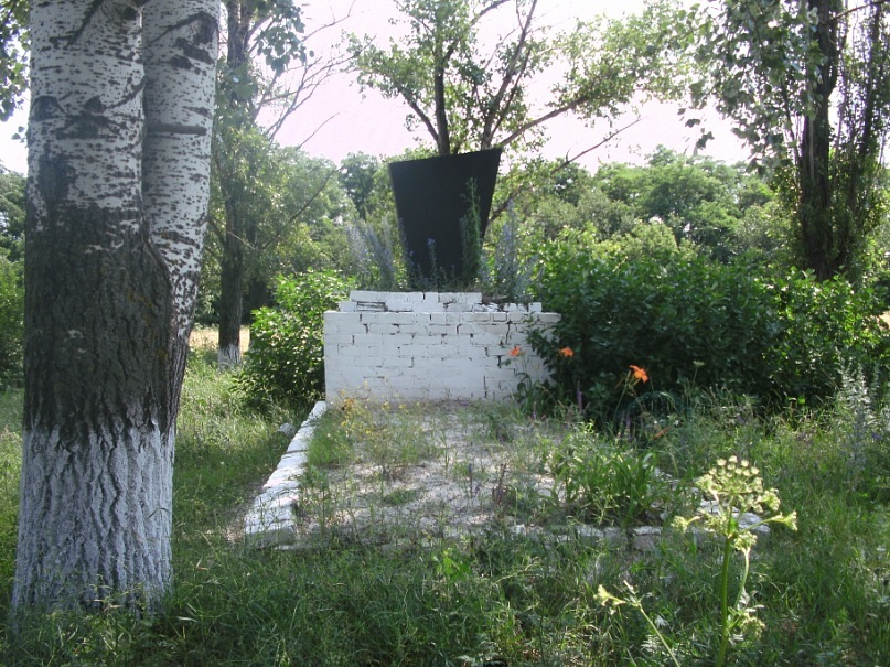 Могила радянських воїнів у селі Благодать Добропільського району